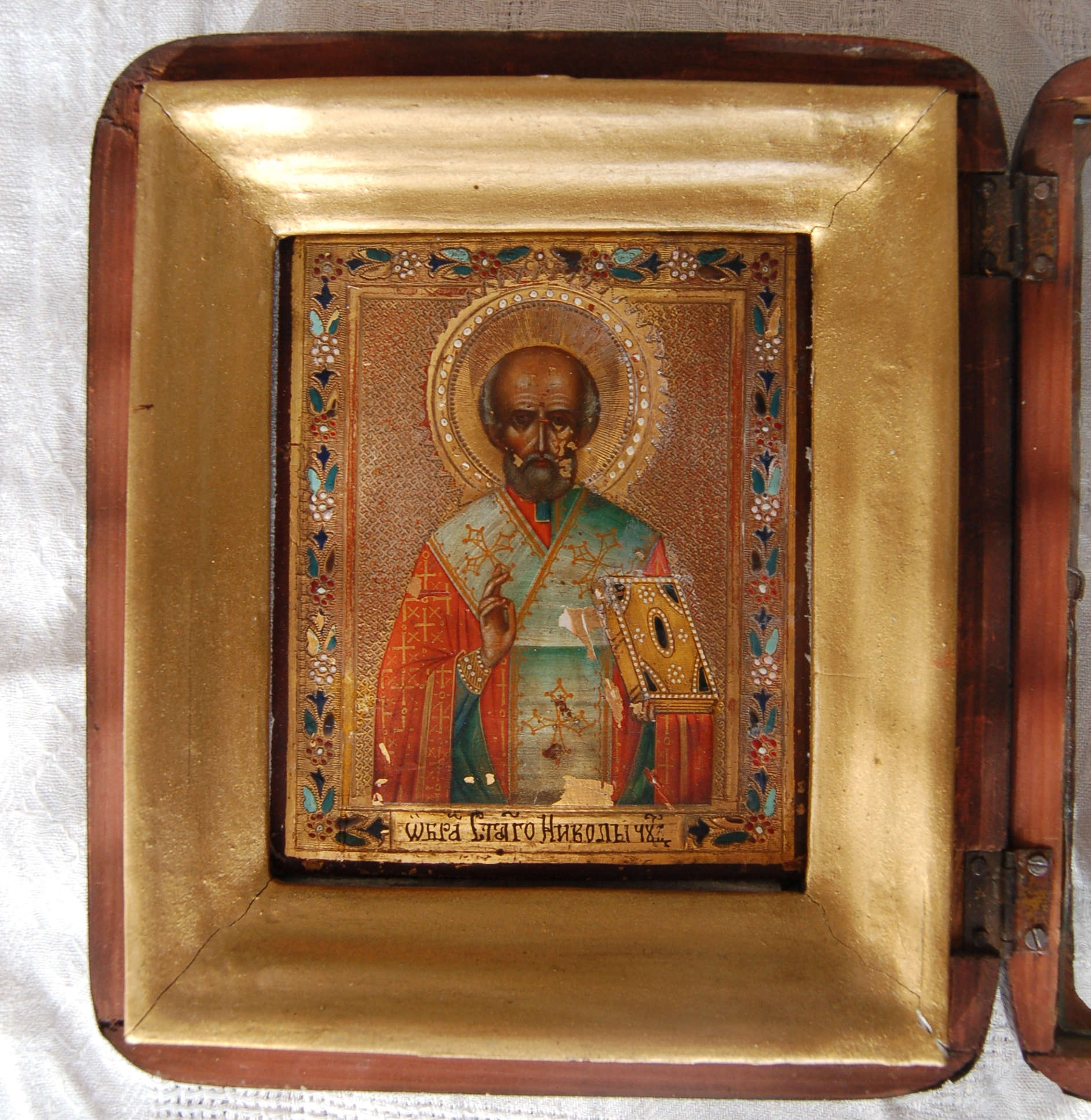 "Образ Святаго Николы Чудотворца" (надписание) в киоте, деревня Дидяково, Чеховский район, Московская область, конец XIX — начало XX века; отреставрирован в 1990-е годы.